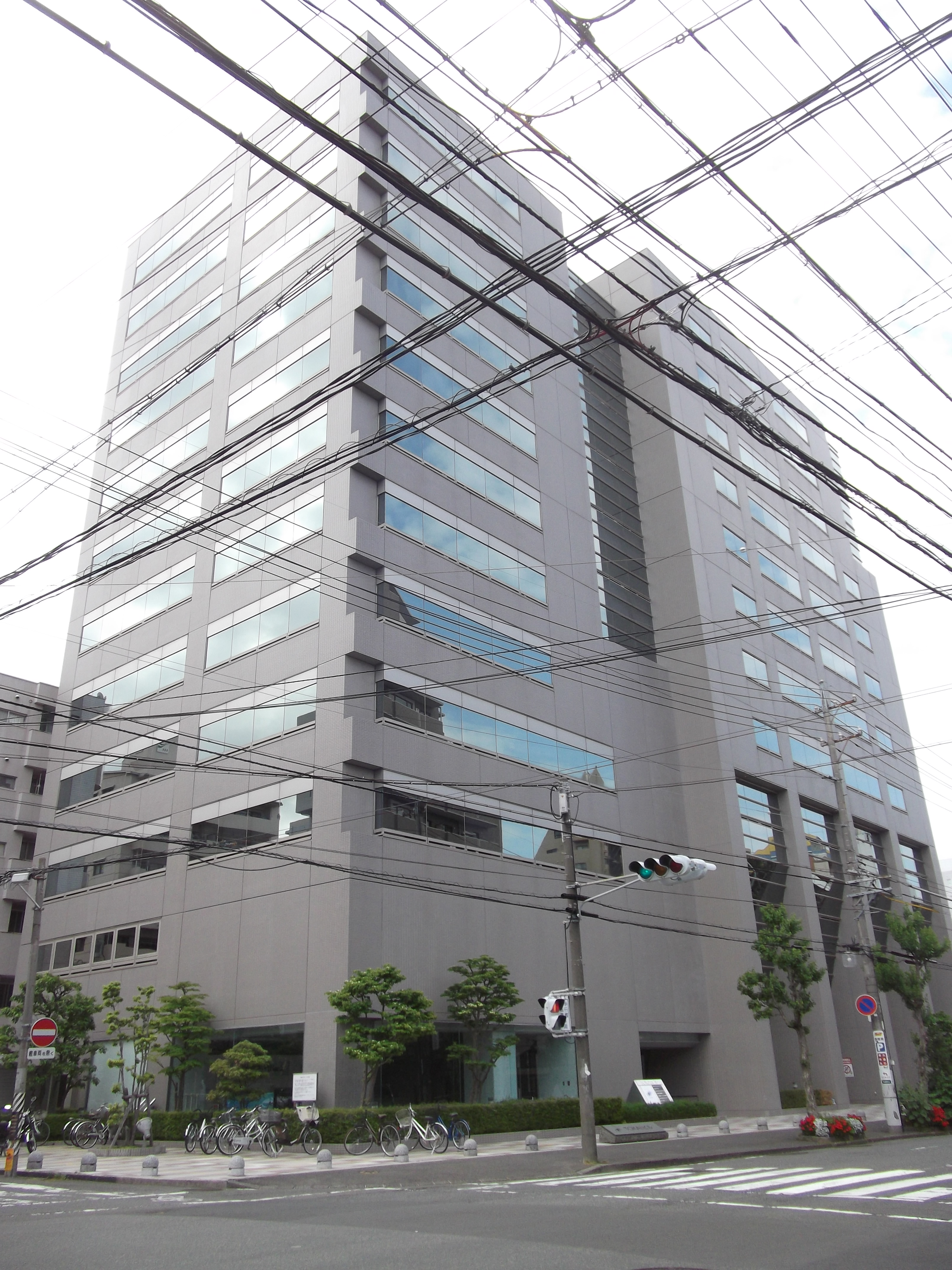 株式会社TOKAIの本社ビル